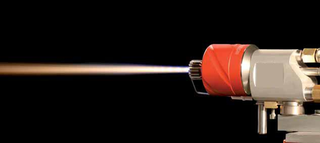 Gasbetriebener HVOF-Spritzbrenner bei der Verarbeitung von Cermet-Pulver (WC-Co 88-12)